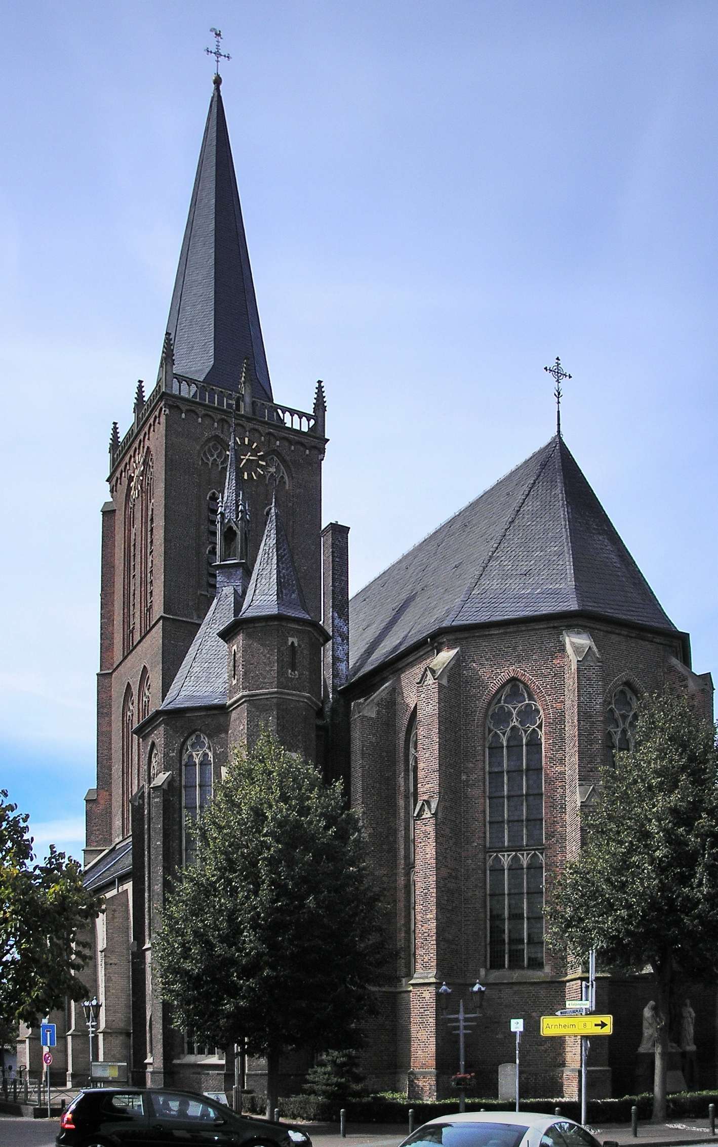 Kirche St. Martin in Emmerich-Niederelten